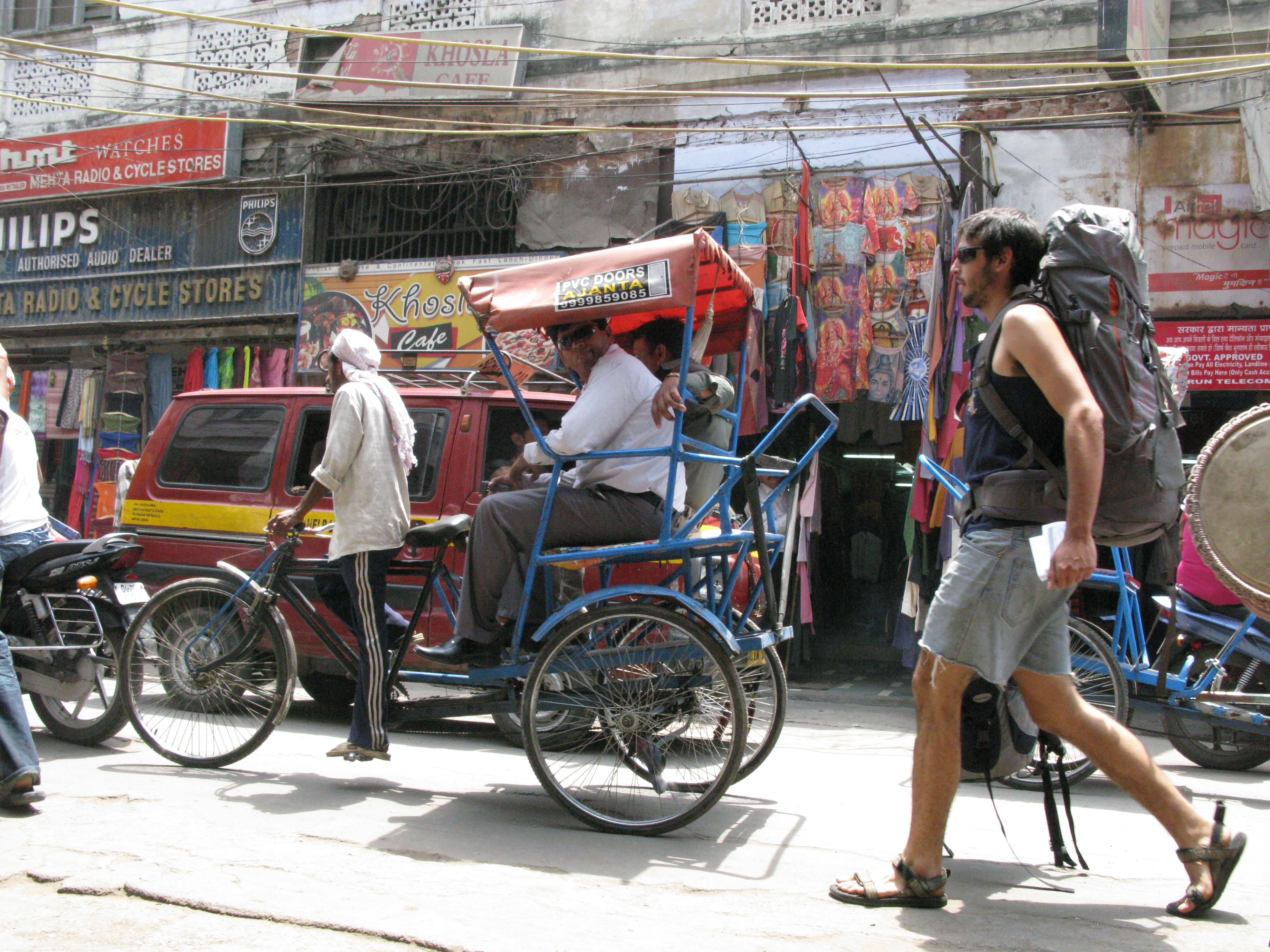 India : New Delhi : Pahar Ganj